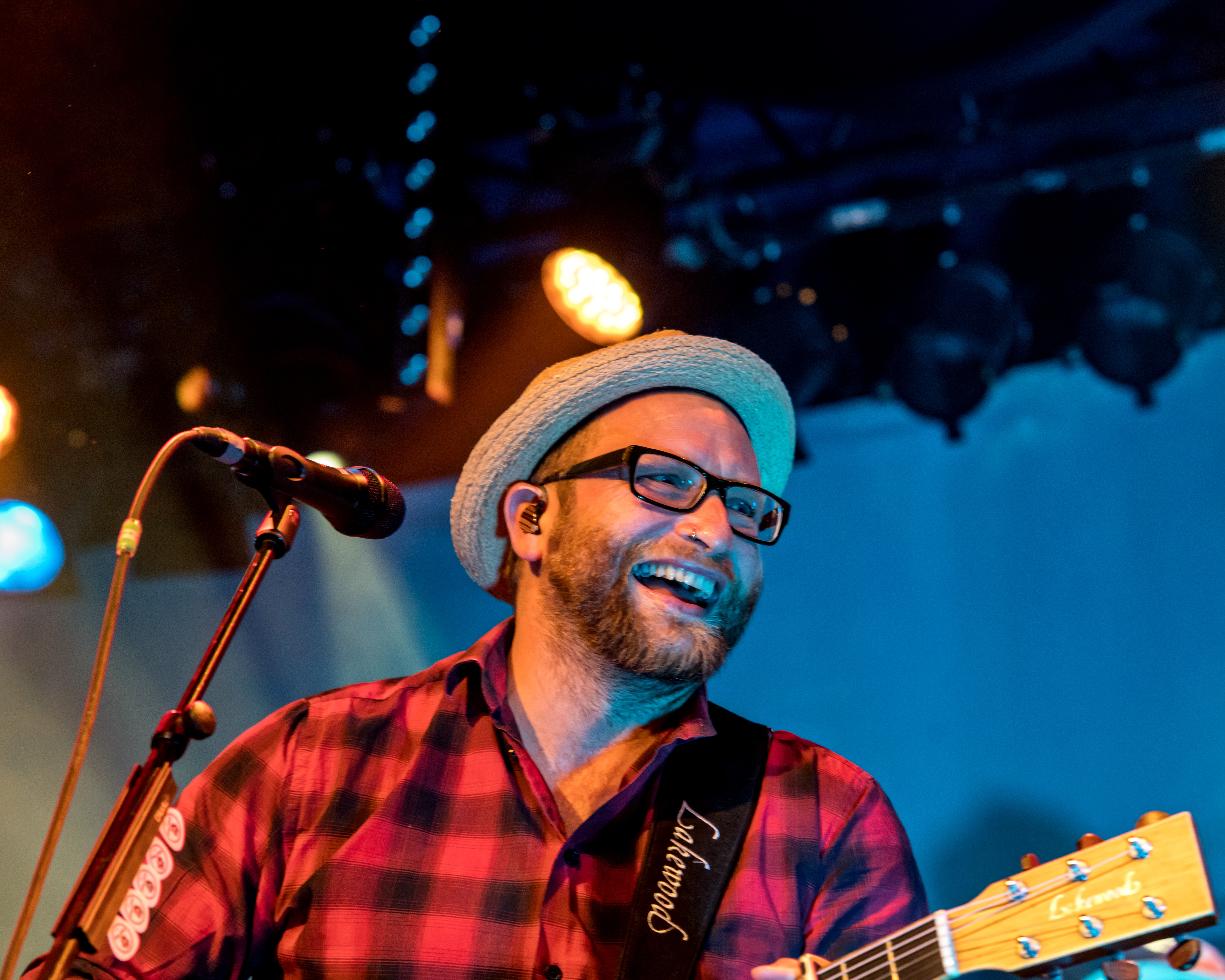 Bilder vom Zelt Musik Festival 2017 in Freiburg im Breisgau Gregor Meyle am 16-07-2017